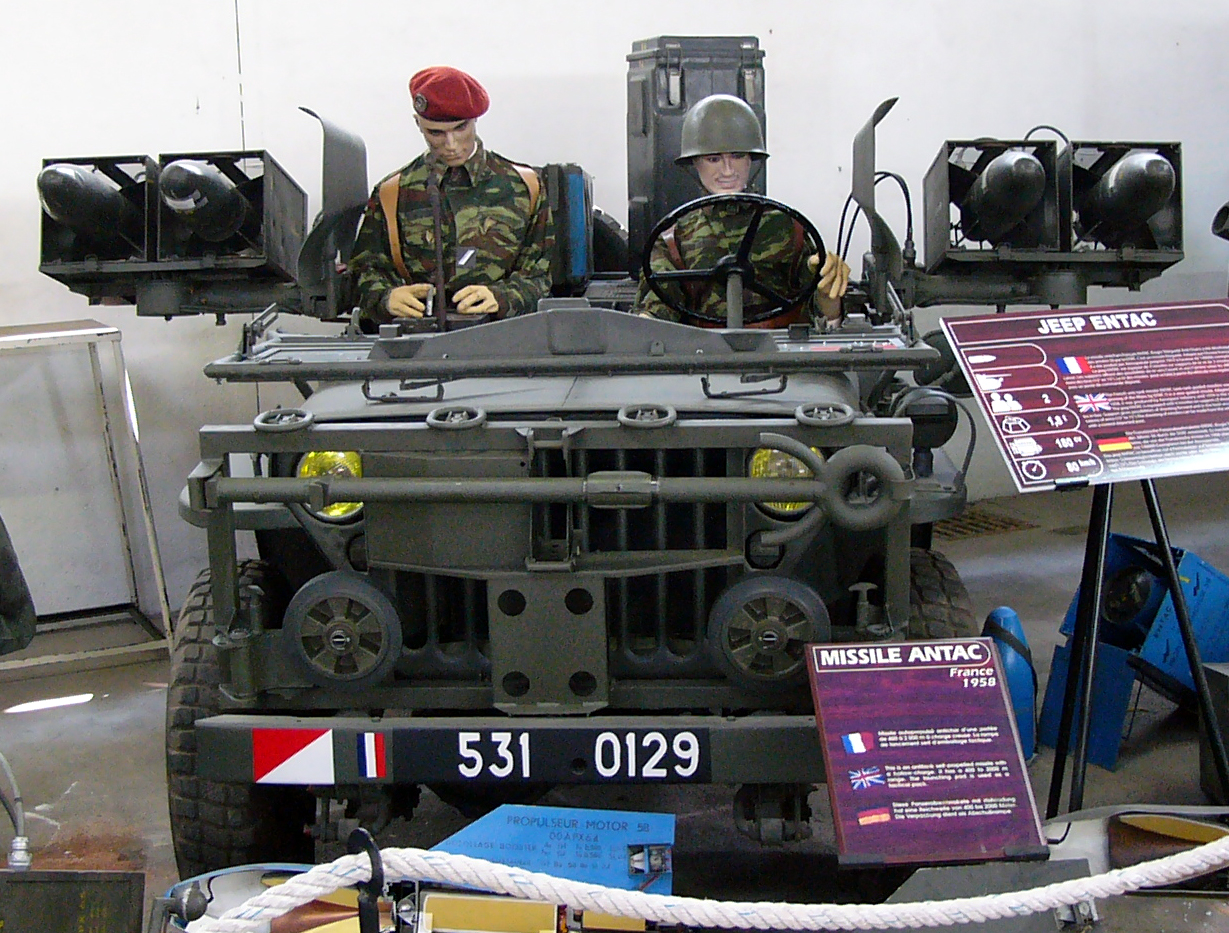 Jeep française équipée de 4 missiles Entac. Photographie provenant du musée des blindés à Saumur (printemps 2011)